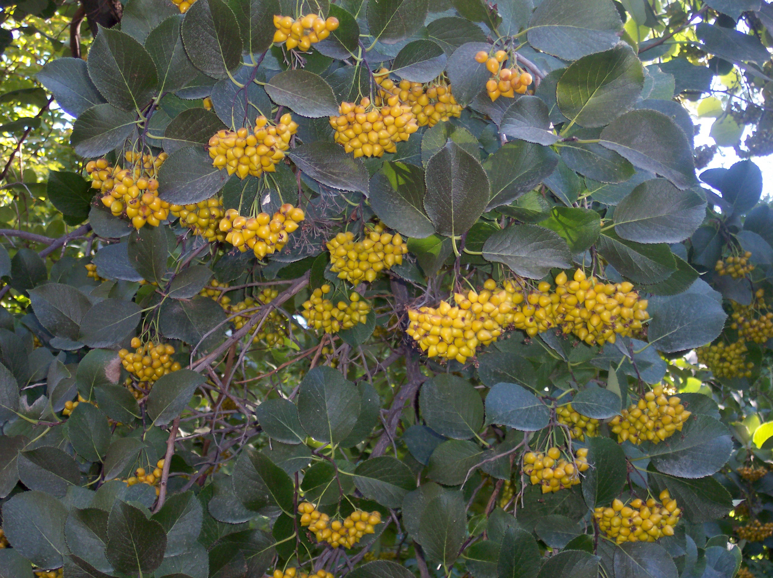 Ehretia dicksonii var. japonica, frutos. Real Jardín Botánico de Madrid.